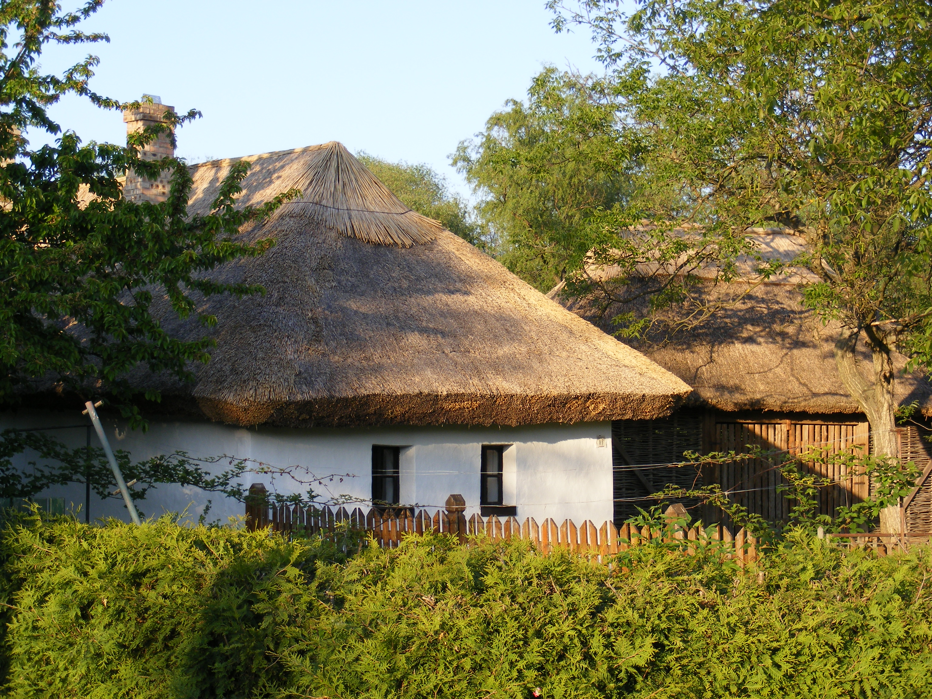 Népi lakóház (Sárospatak, Gárdonyi Géza utca 11.) This is a photo of a monument in Hungary. Identifier: 3092